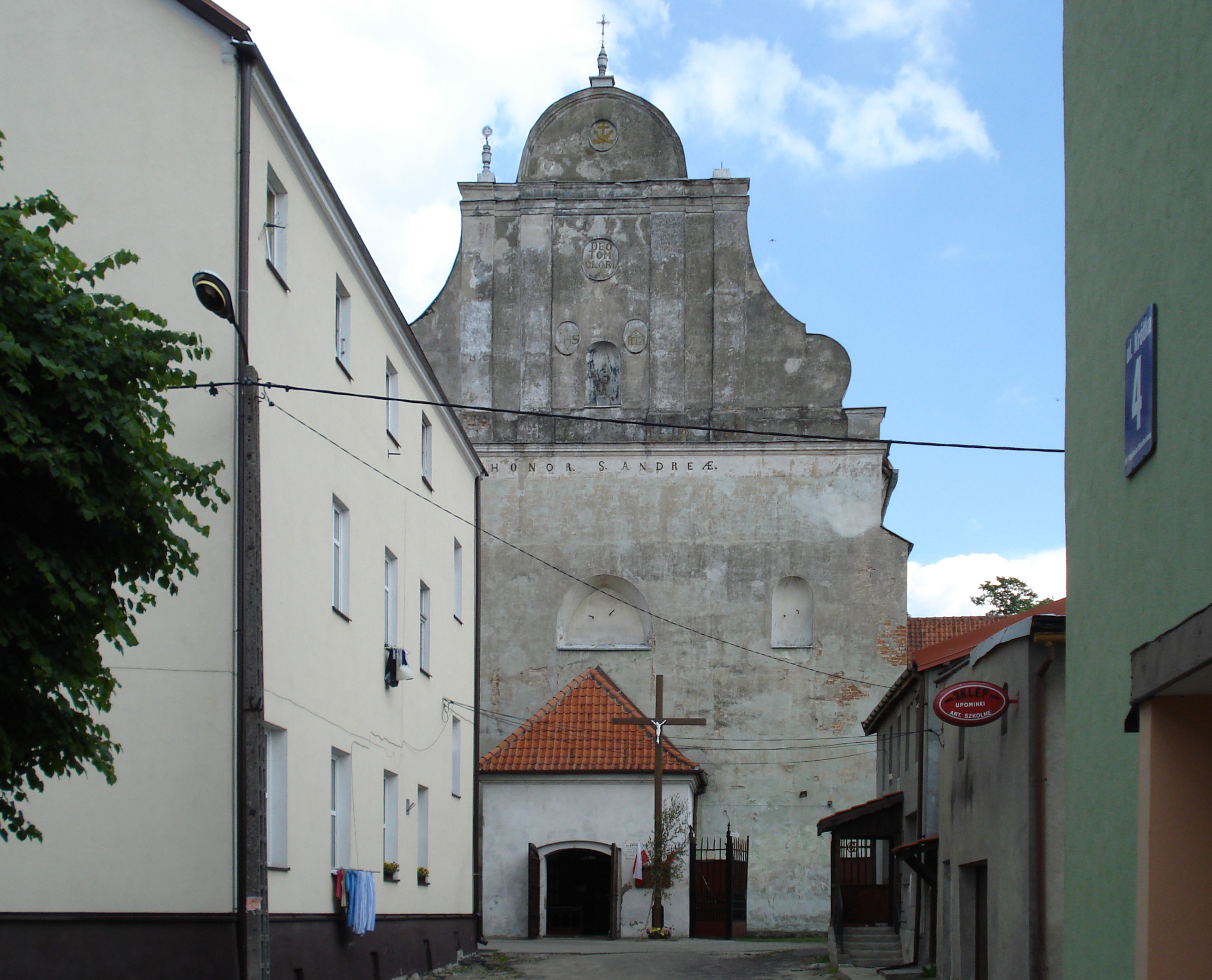 Kościół św Andrzeja w Barczewie z XIV wieku